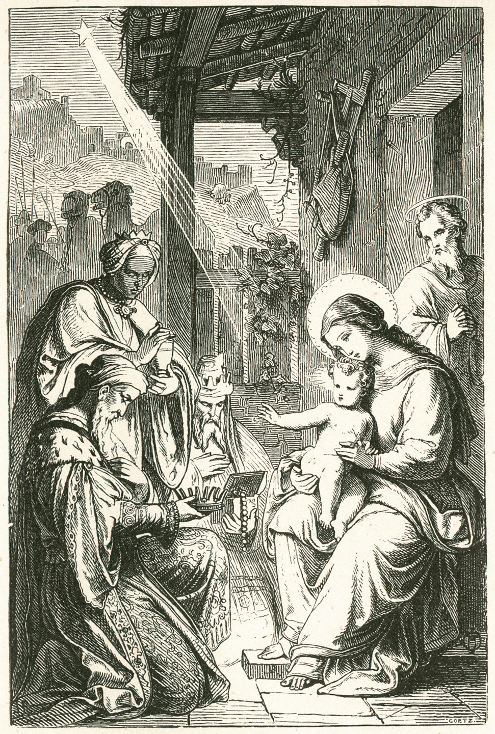 Andreas Müller: Die heiligen drei Könige. In Holz geschnitten von B. Goertz.